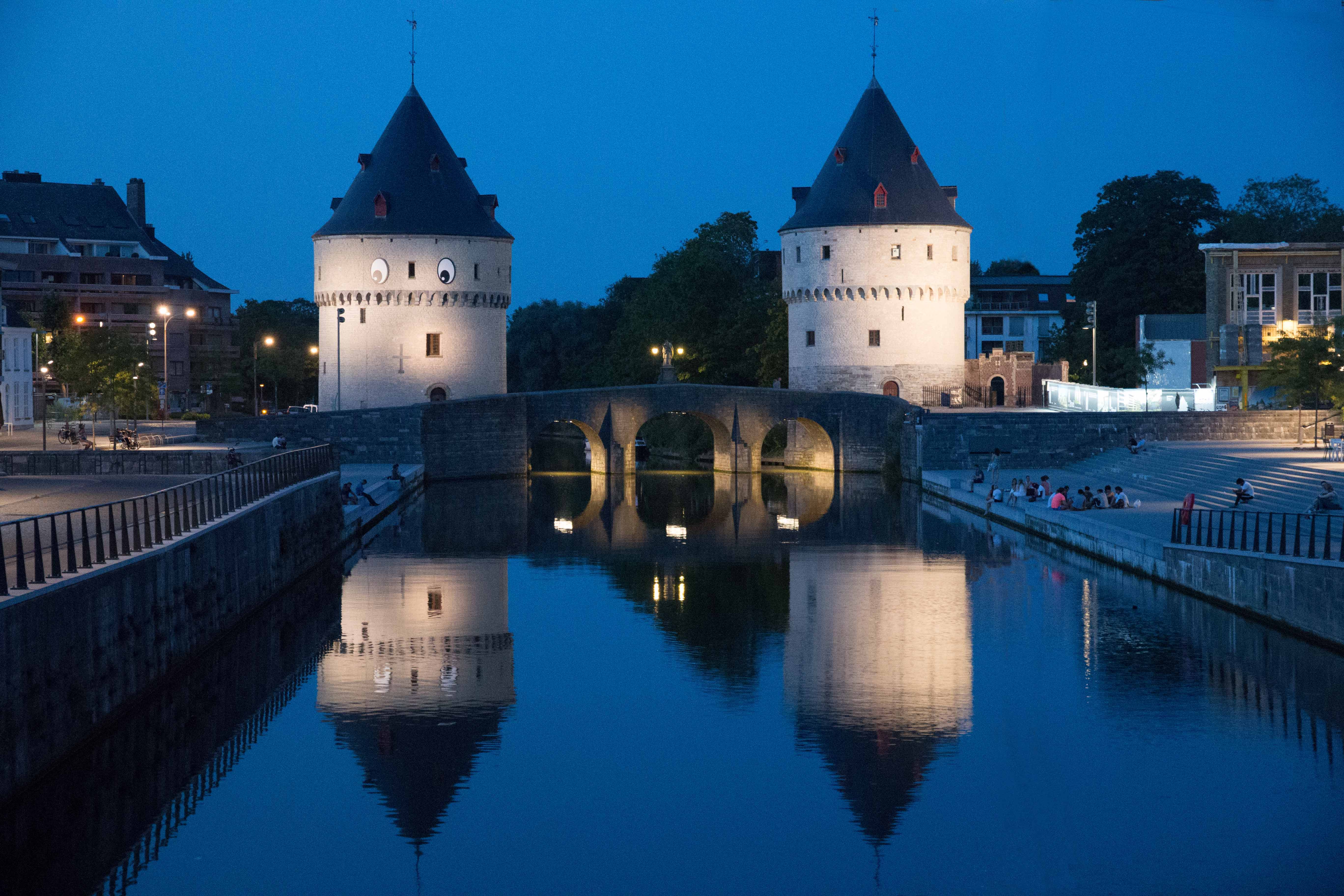 Broeltorens in Kortrijk This photo of immovable heritage has been taken in the Flemish Region